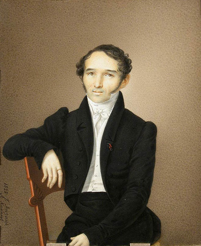 Лев Дмитриевич Крюков (1783-1843). Портрет Карла Фёдоровича Фукса. Казань, 1828. Бумага, акварель.